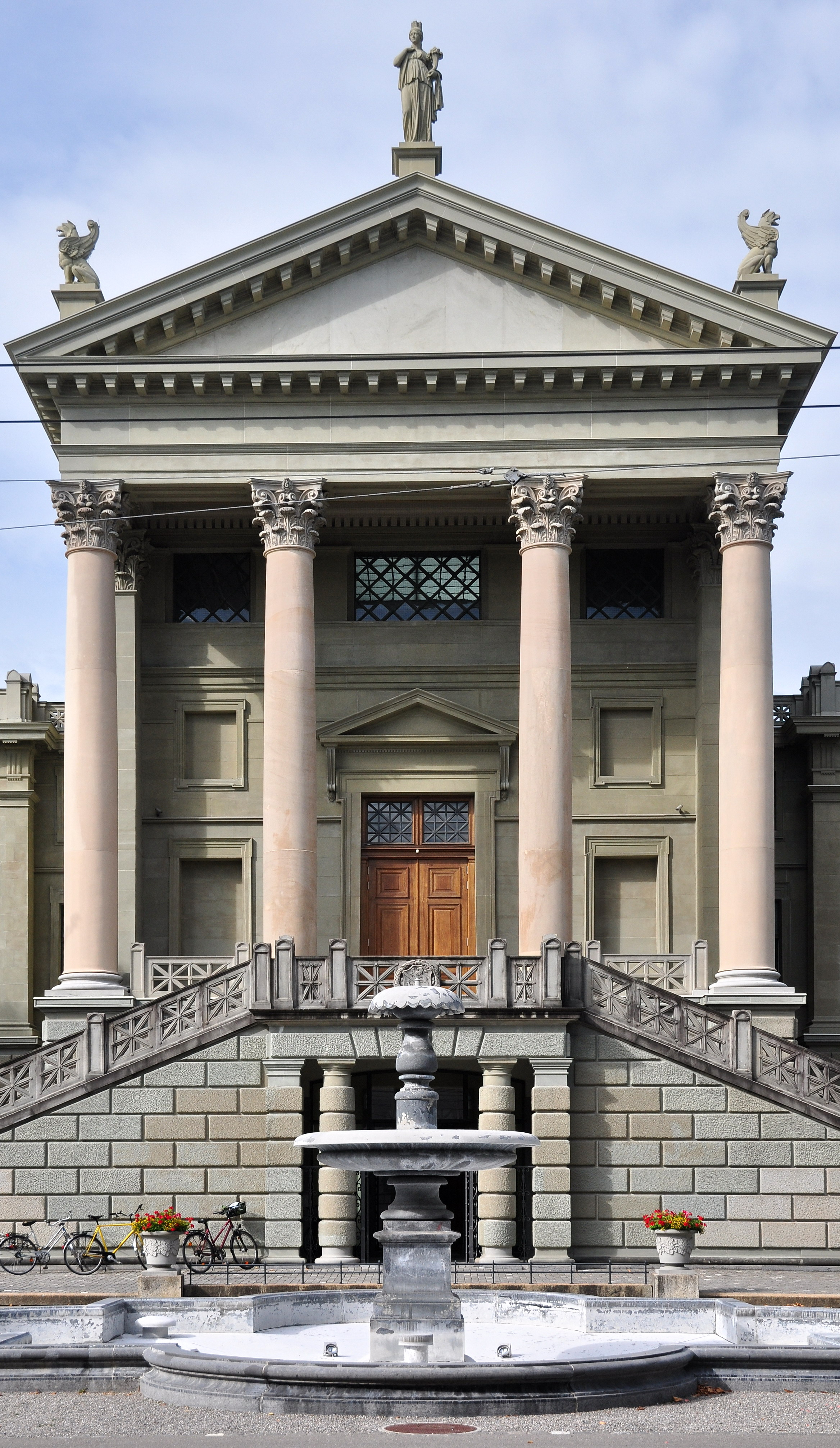 Stadthaus sowie Stadtarchiv Winterthur, Stadthausstrasse 4 A in Winterthur (Switzerland)